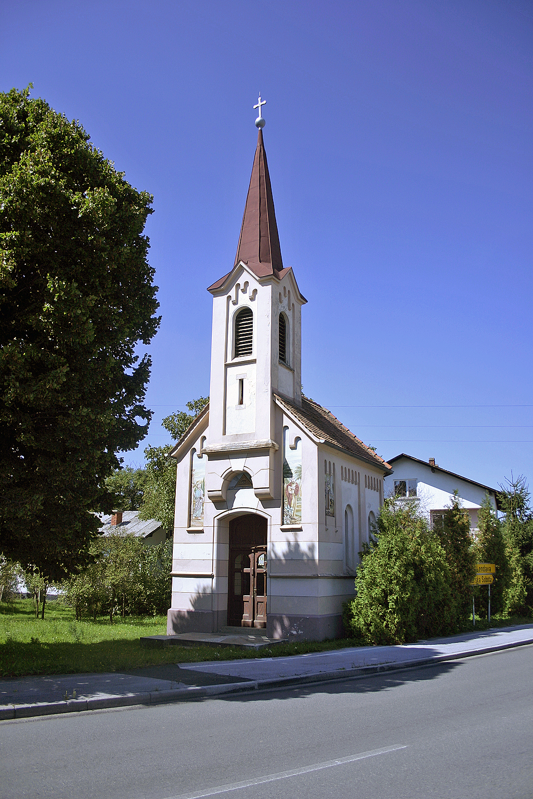 »Rousova kapela«, Beltinci. »Rous« Chapel, Beltinci. »Rous« Kapelle, Beltinci.